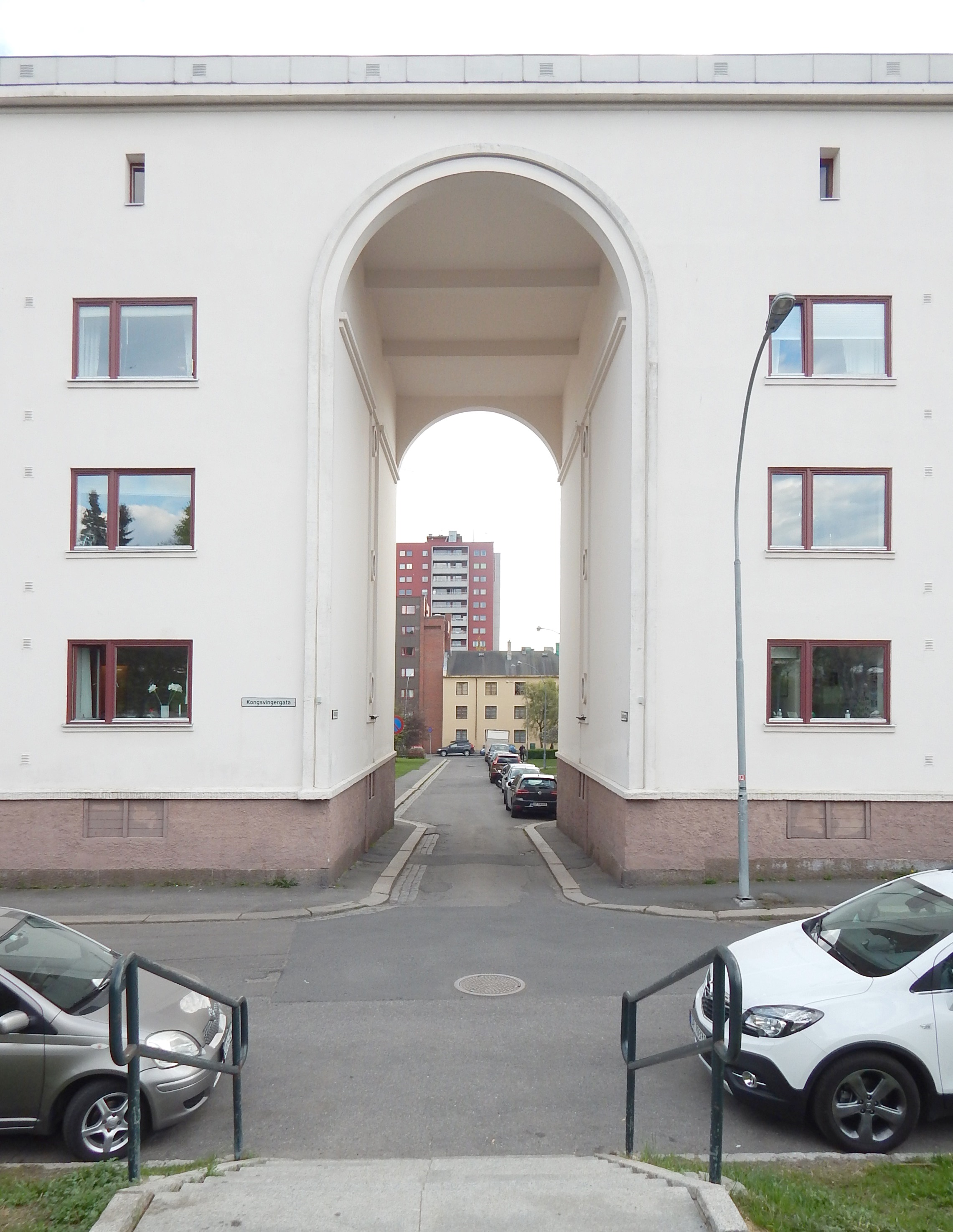 Tønsberggata sørover fra Bjølsenparken